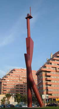 Escultura dedicada a Mislata del artista plástico valenciano Miquel Navarro Valencià: Escultura dedicada a Mislata de l'artista plástic valencià Miquel Navarro